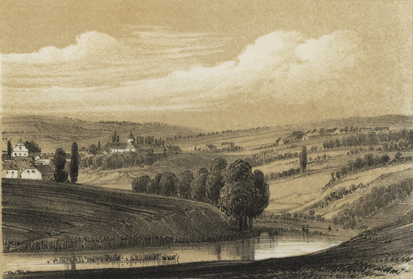 Hloubětín